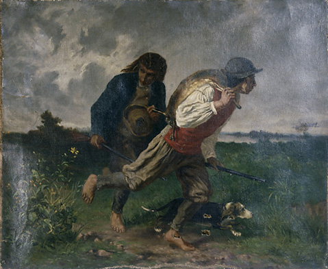 « Retour de chasse ou Les braconniers bretons » peinture Alexis Mauflastre (1839-1905). Hauteur 38cm, largeur 46 cm (dimensions du châssis). Il s'agit d'une copie d'un tableau d'Evariste-Vital Luminais (1822-1896), acheté par l'Etat au Salon de 1868 et mis en dépôt au musée municipal des Beaux-Arts de Poitiers la même année ; la copie a pu être peinte en 1870, année pendant laquelle l'auteur fut substitut à Poitiers.